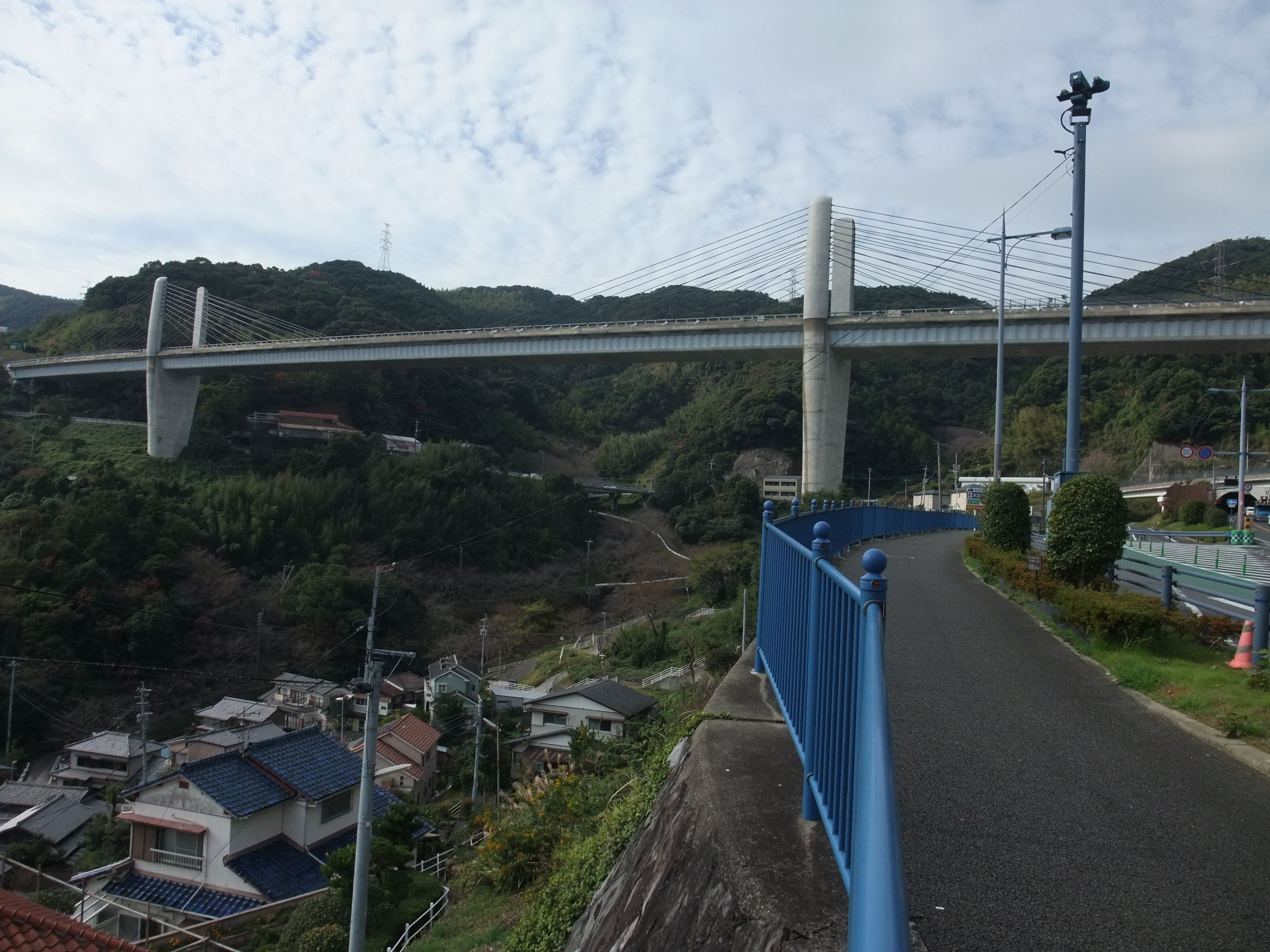 日見夢大橋